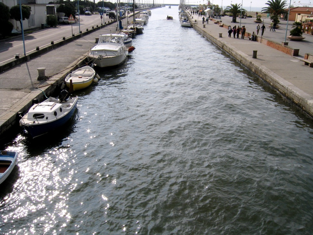 Channel, Viareggio, Toscana, Italy